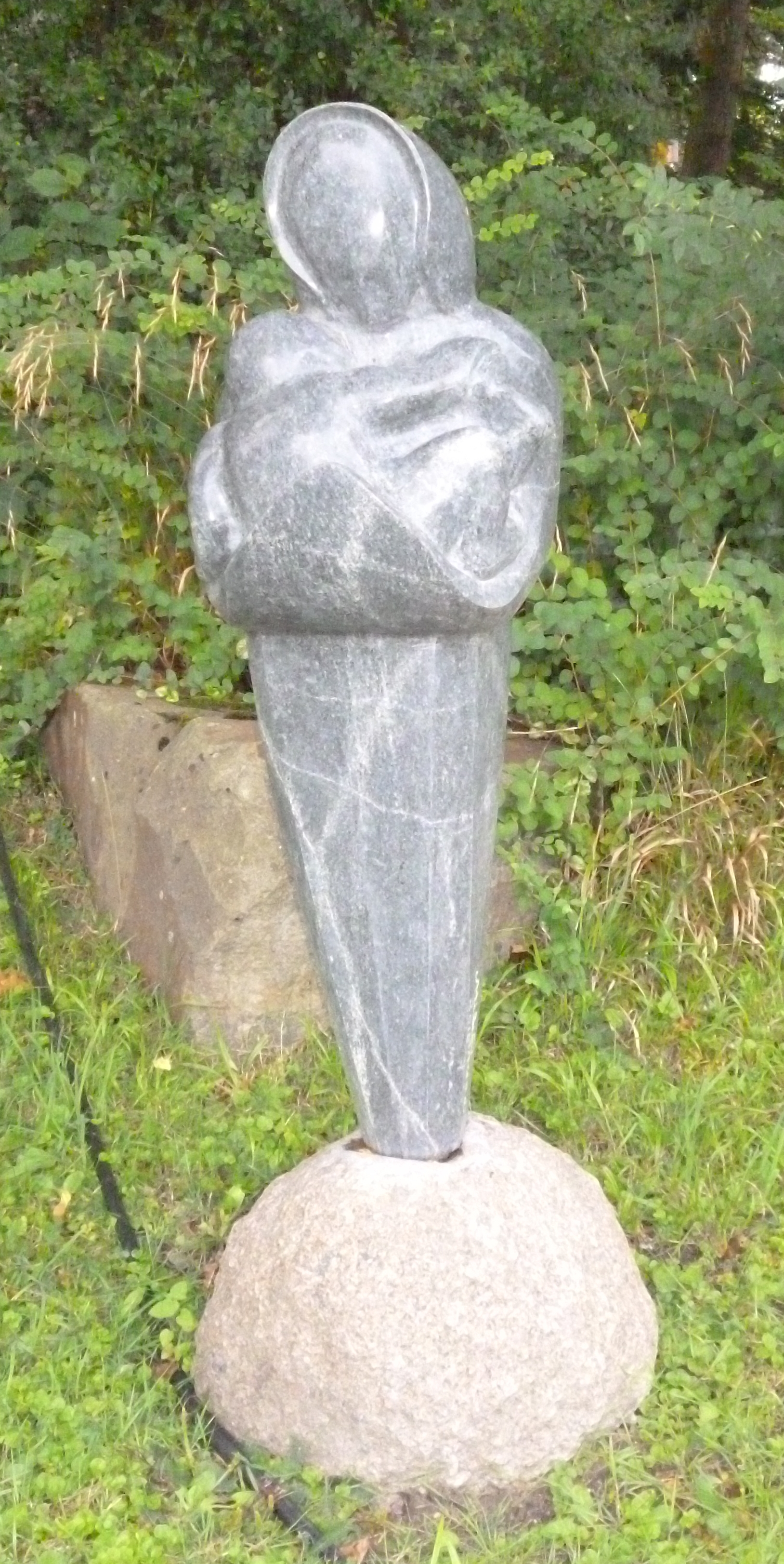 Skulptur "Mutterliebe" aus Rügener Granit, 2015, Westfalenpark Dortmund, Mile Prerad. Gestiftet von Hildegard Frommert/Freundeskreis Westfalenpark